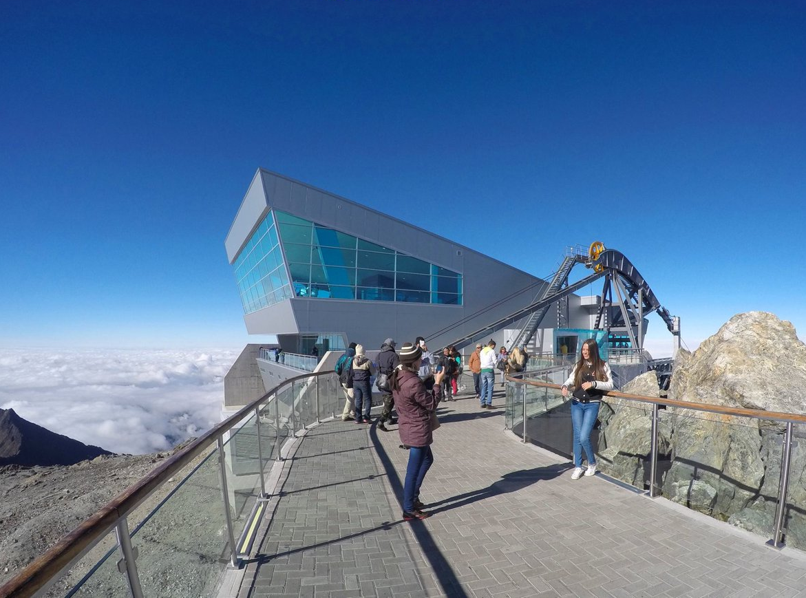 teleférico de Mérida (mukumbari), parque nacional sierra nevada, andes de Venezuela, en febrero de 2017 11